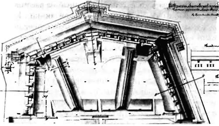 План форта "Граф Берг".